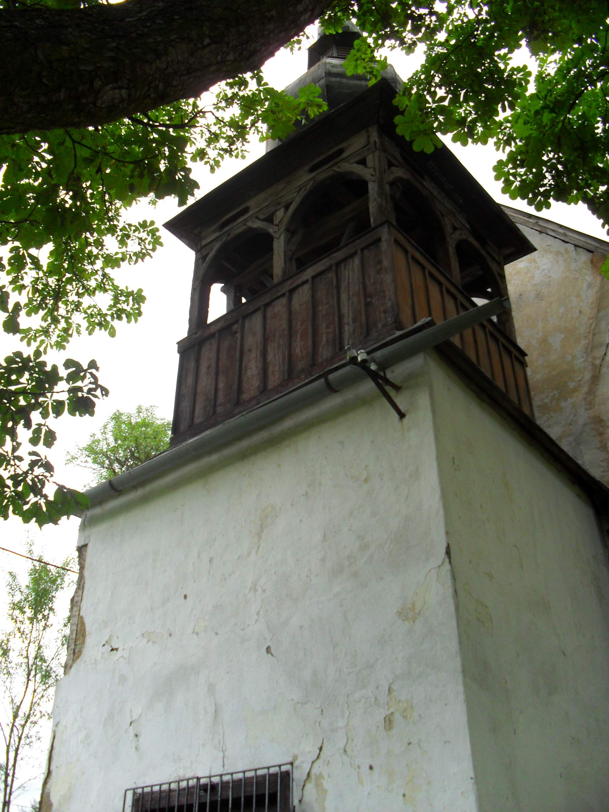 Lőkös - evangélikus templom